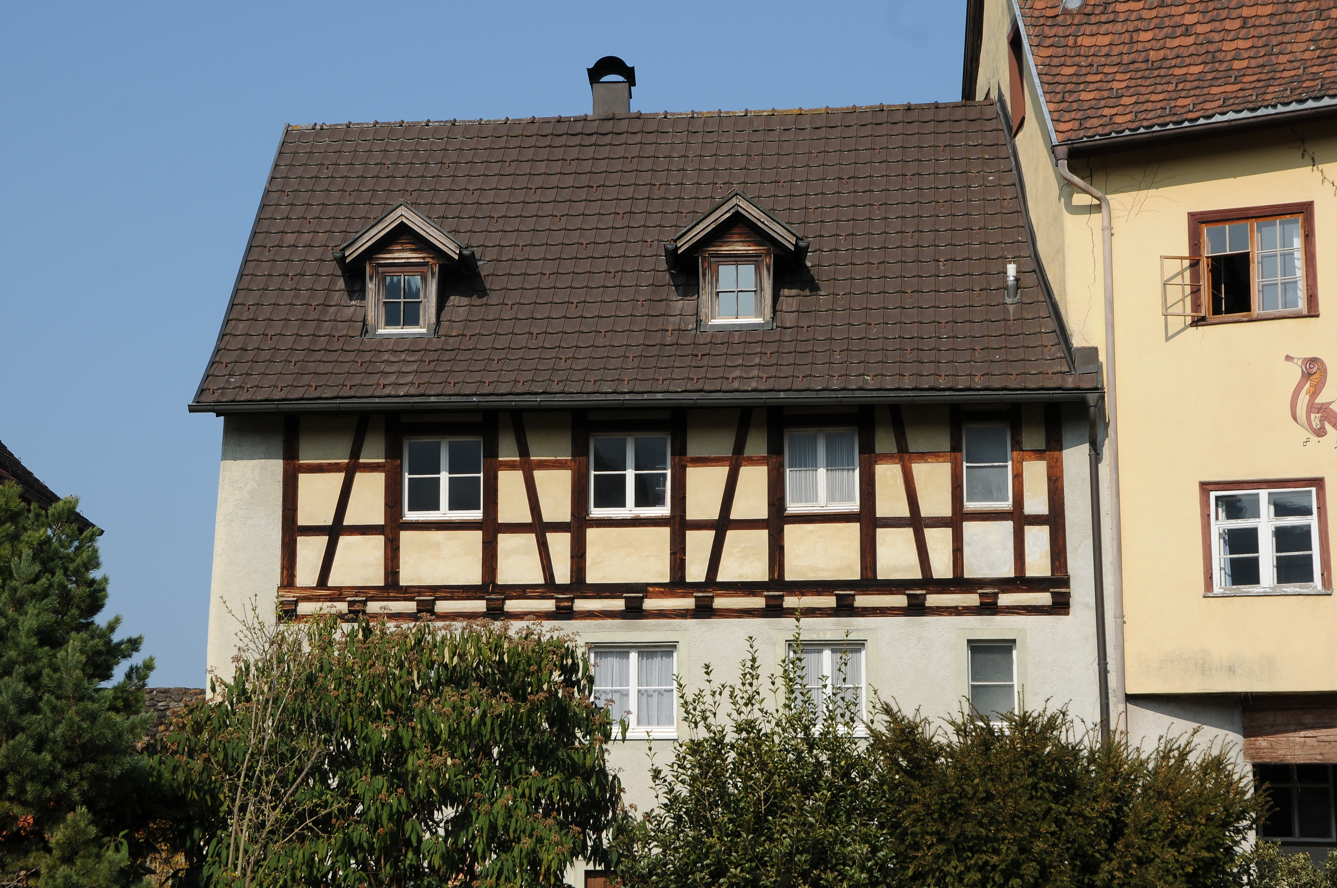 Ehregutaplatz Nr.2 Ostseite in der Oberstadt von Bregenz, Vorarlberg